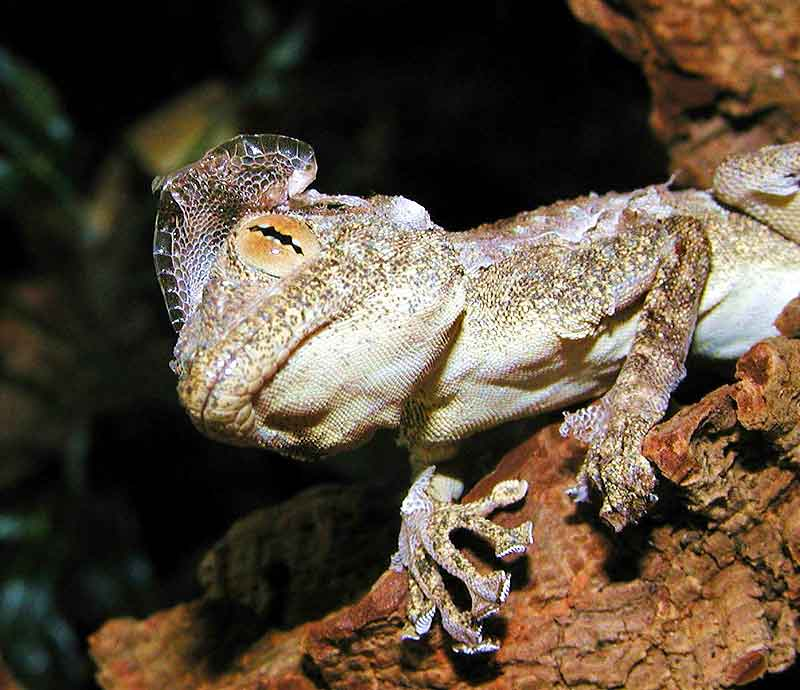 Photographie d'un Gecko Ptyodactylus hasselquistii en cours de mue en milieu naturel.